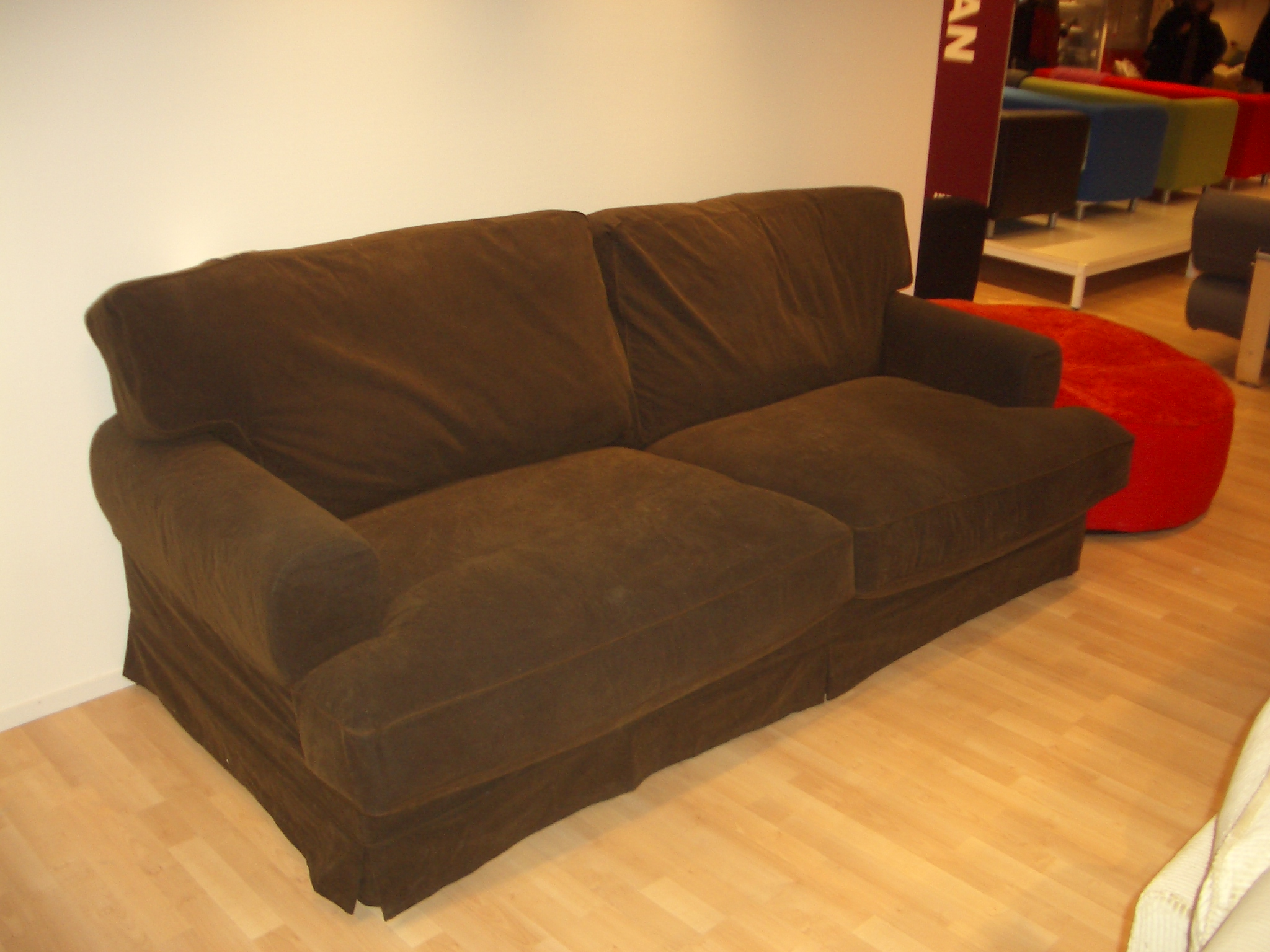 Boarisch: Brauns Sofa.